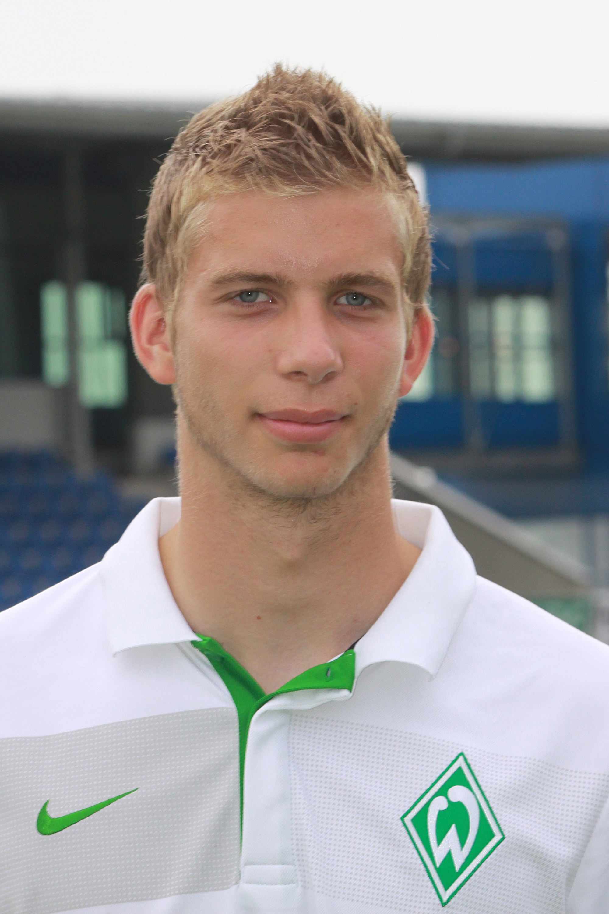 Felix Wiedwald - SV Werder Bremen (1)